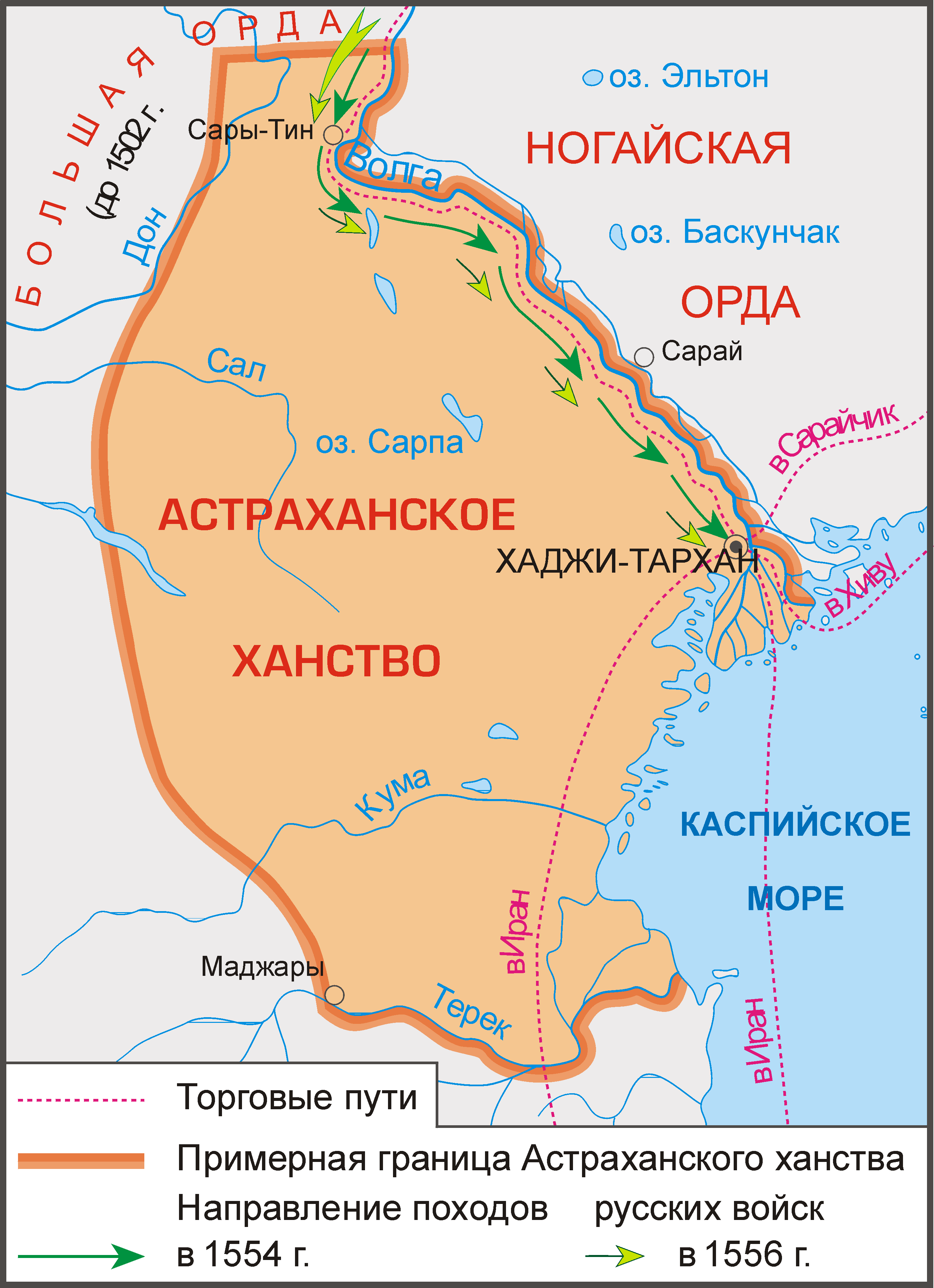 Карта Астраханского ханства (ошибка художника ! - Маджар вместо Кумы помещён на Тереке). Присоединение Астрахани к Московскому царству. Астраханское ханство в нач. XVI в.